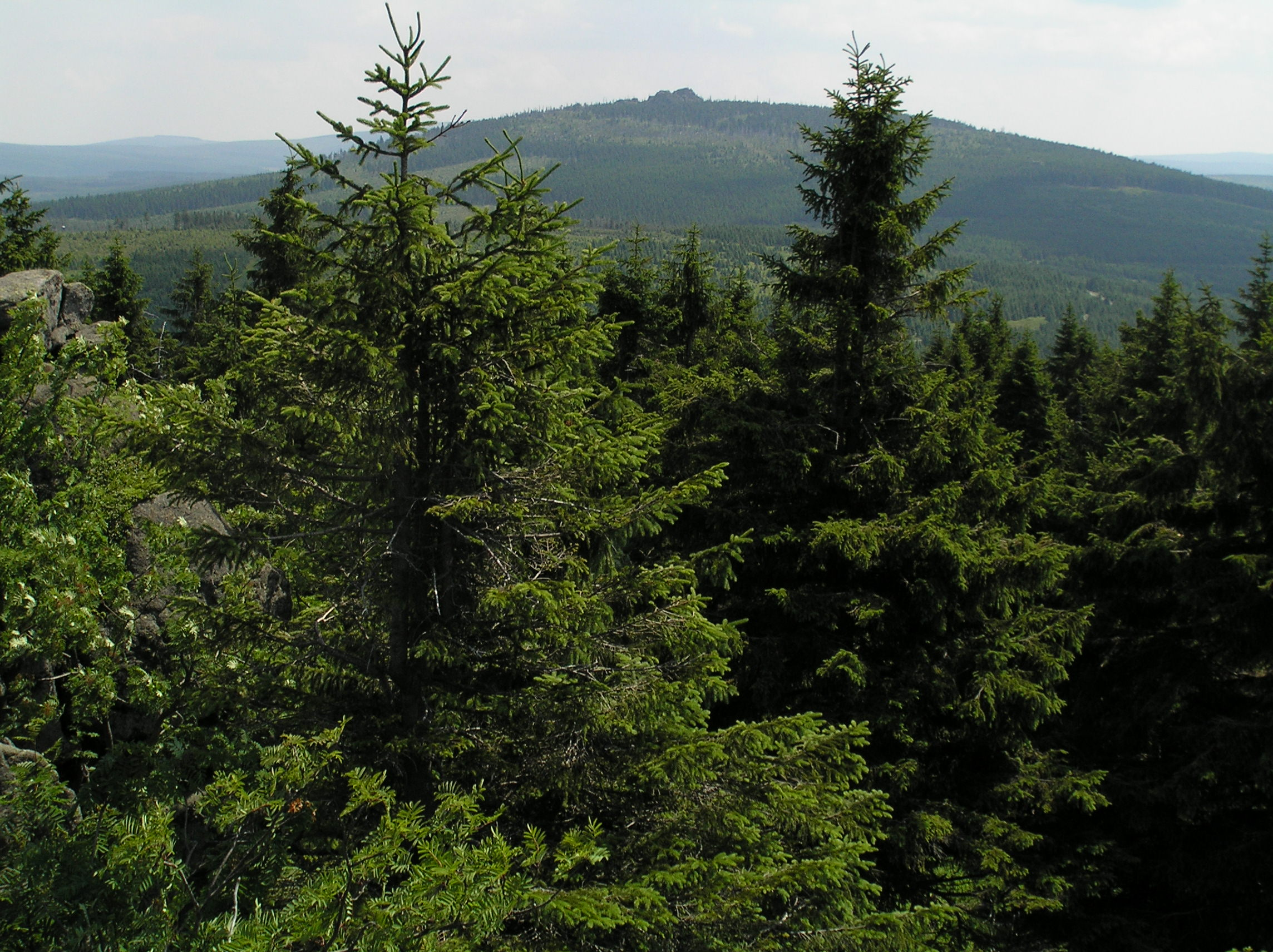 PR Černá hora - pohled na Jizeru ze Sněžných věžiček